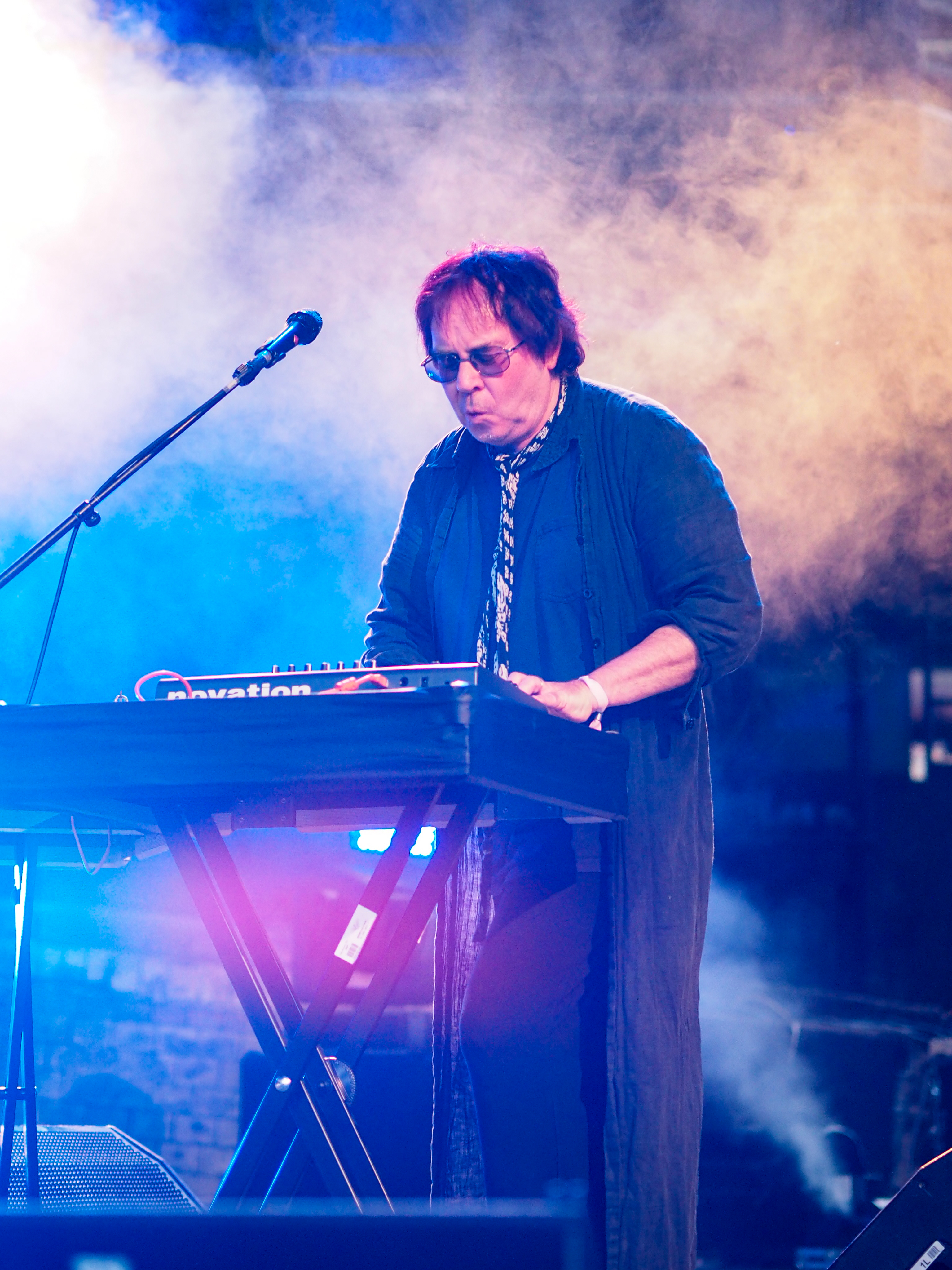 Traumzeit festival 2017